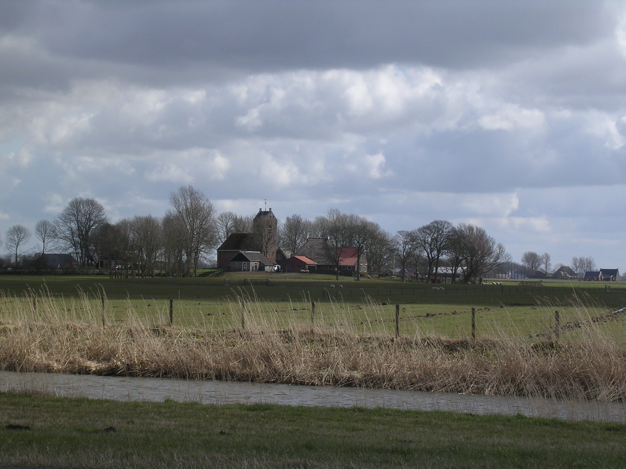 Jouswier